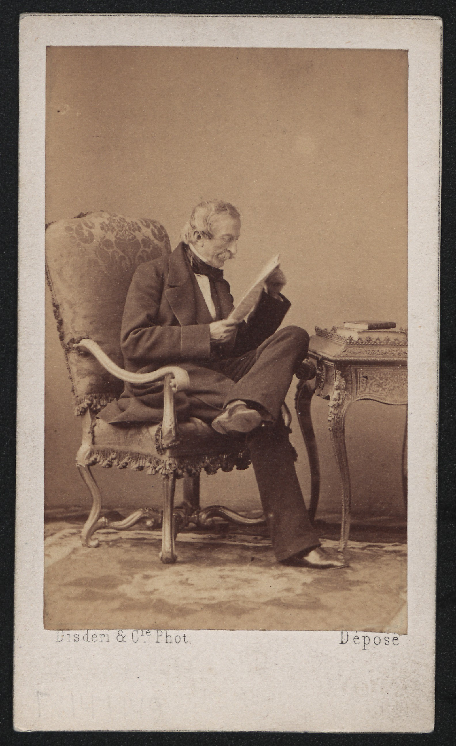 Massimo d'Azeglio, [1859-1861]